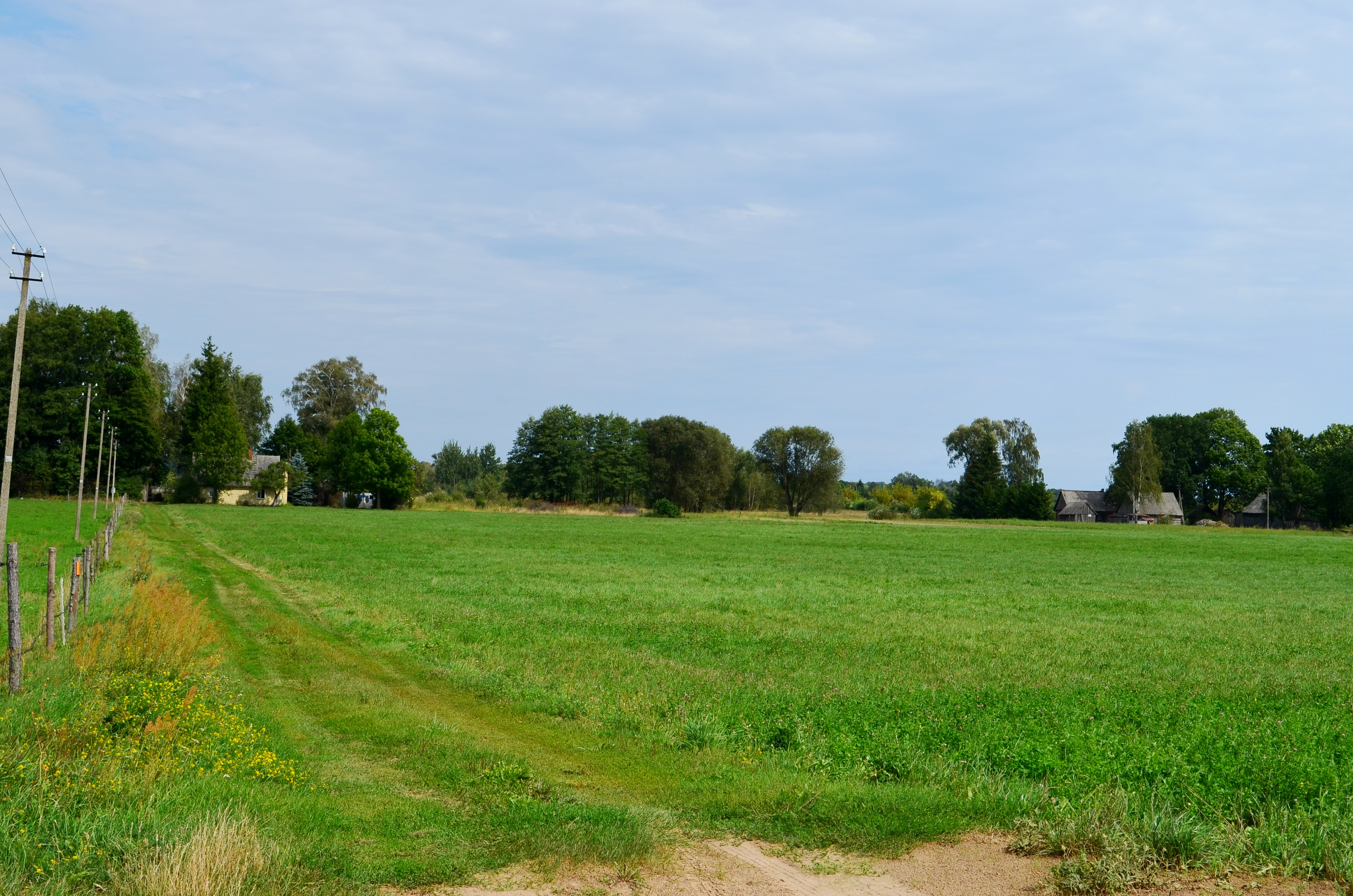 Piliūnai, Vilkaviškio raj.